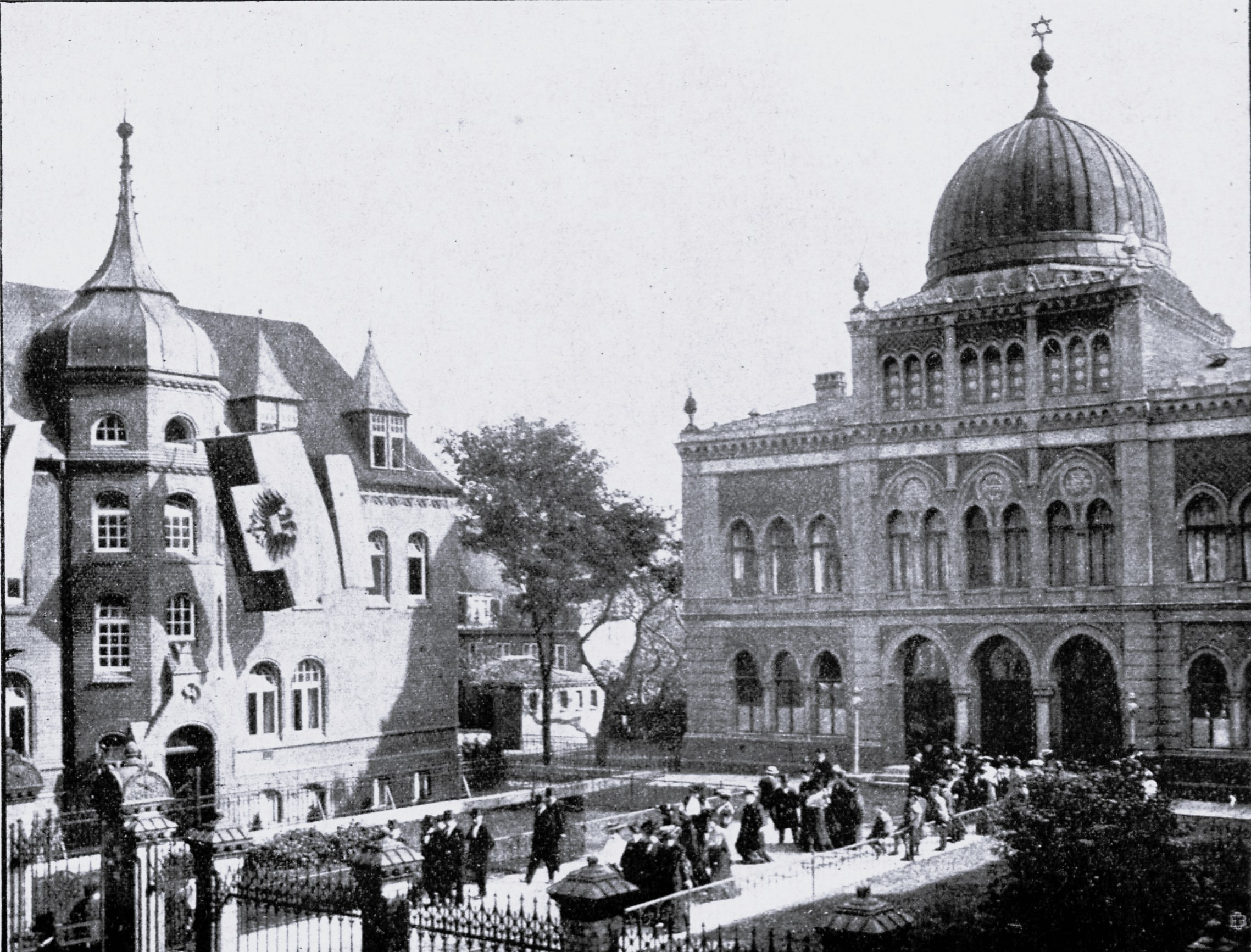 Einweihungsfeier des Israelitischen Heims zu Lübeck. Anmerkungen: ab 1914 nur noch Angestellter, letzte Veröffentlichung in den Vaterstädtischen Blättern Anfang 1917, gestorben 1919; Zeichen [gleich] nach Abgleich mit Adressbüchern jener Zt. ist das Zeichen ein mit C überlagertes L; Todesjahr 1919